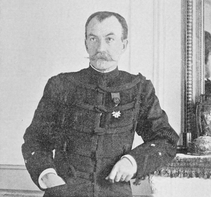 Général de Pellieux.